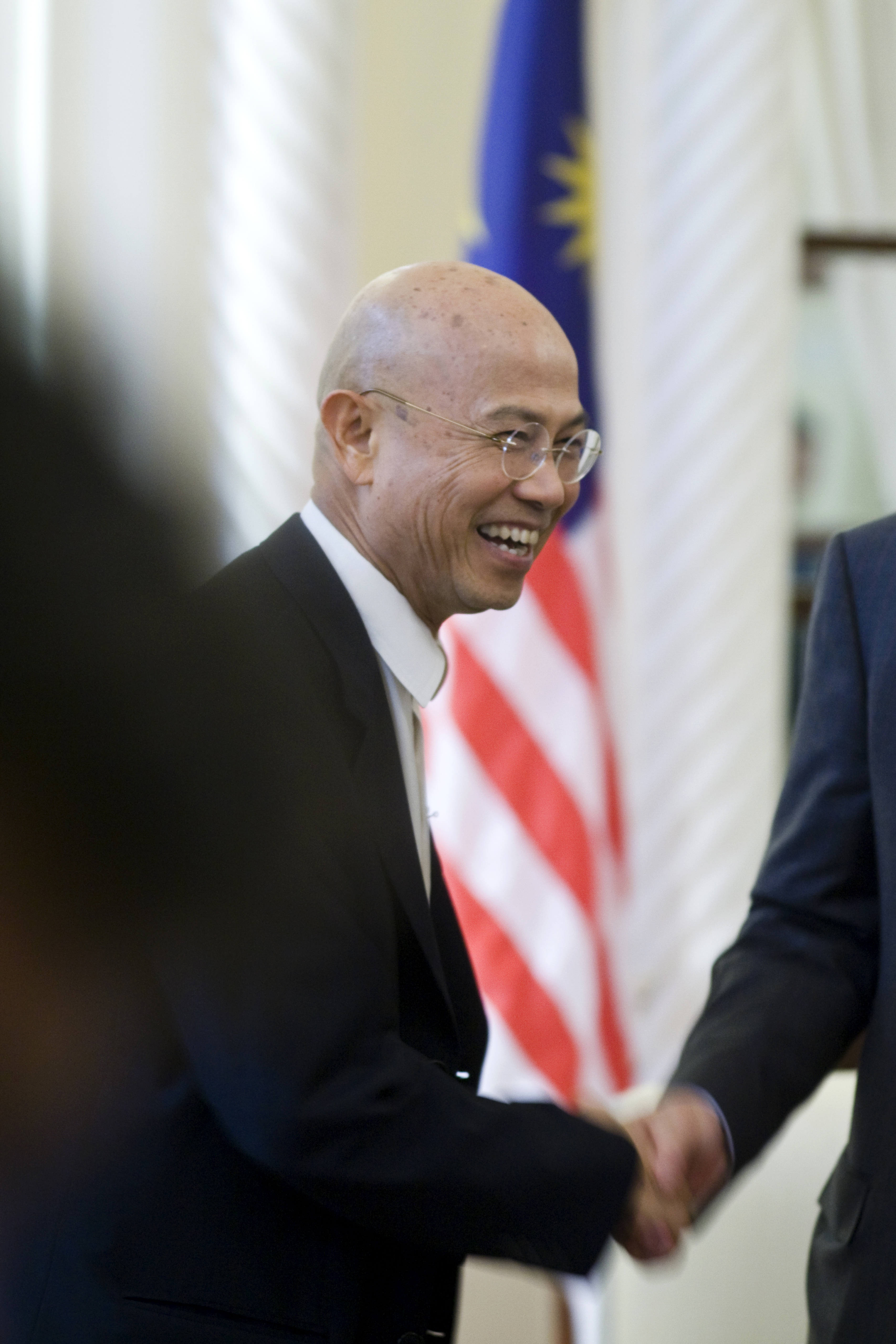 นายกรัฐมนตรีประเทศไทยและประเทศมาเลเซียให้สัมภาษณ์ สำนักข่าว The Nation ณ​ ห้องสีเหลือง ตึกสันติไมตรี หลังนอก ทำเนียบรัฐบาล 8ธันวาคม2552 (The Official Site of The Prime Minister of Thailand Photo by พีรพัฒน์ วิมลรังครัตน์)